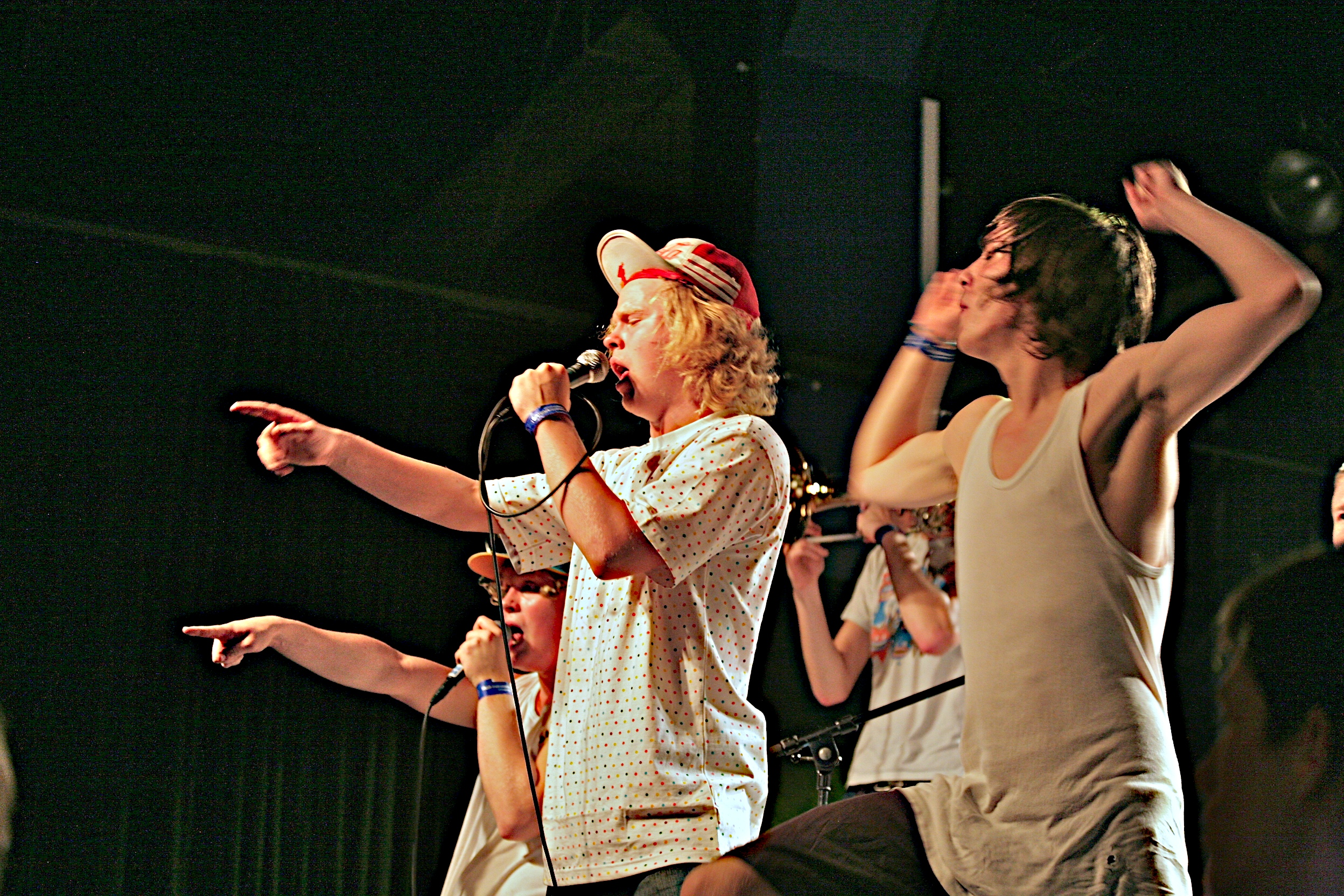 Kakkmaddafakka